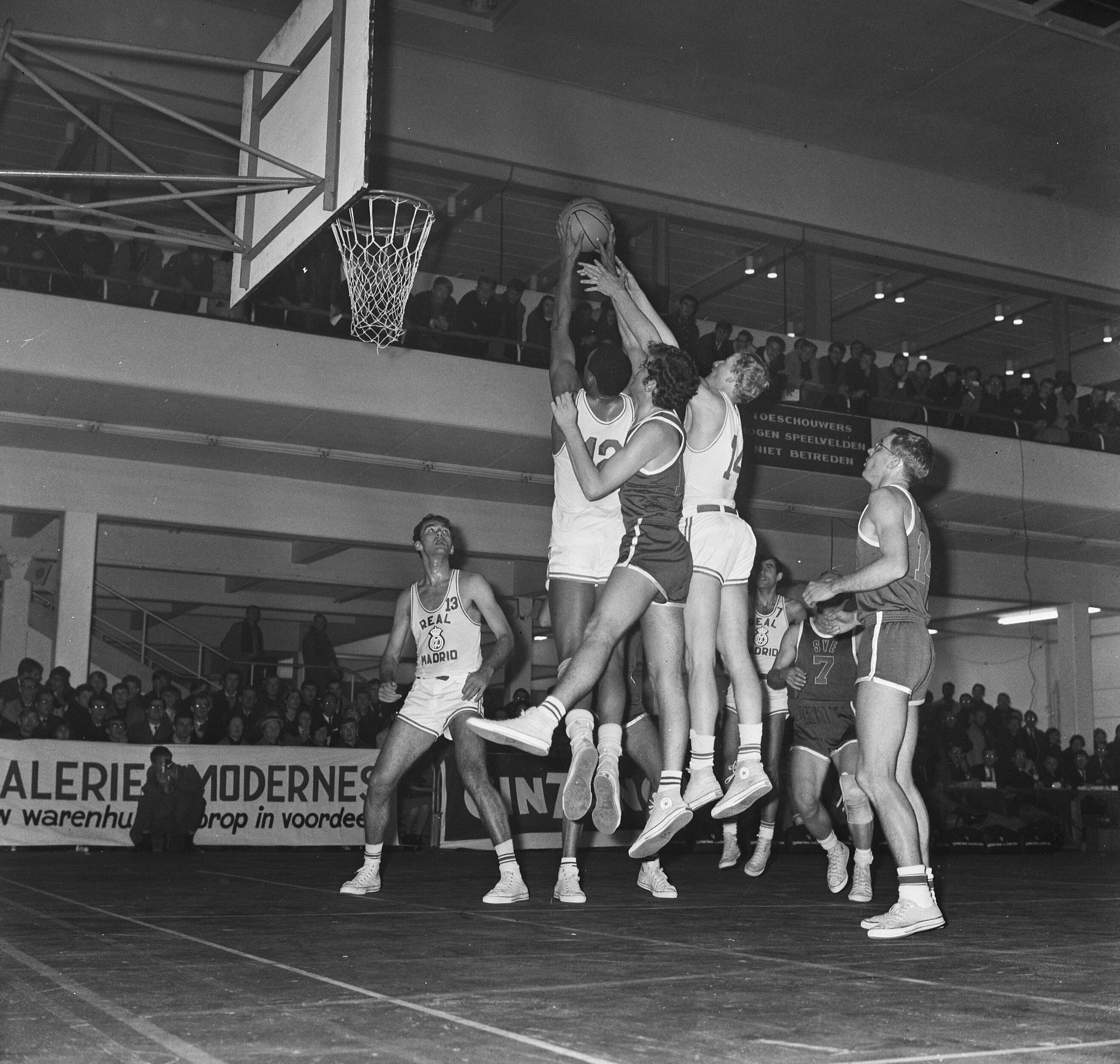 Collectie / Archief : Fotocollectie Anefo Reportage / Serie : [ onbekend ] Beschrijving : Europa-cup Basketball SVE tegen Real Madrid te Utrecht, aanval van de Nederlanders (donker shirt) Datum : 8 december 1967 Locatie : Utrecht Trefwoorden : BASKETBAL, aanvallen, shirts Persoonsnaam : Donker, Europa-Cup Instellingsnaam : Real Madrid Fotograaf : Koch, Eric / Anefo Auteursrechthebbende : Nationaal Archief Materiaalsoort : Negatief (zwart/wit) Nummer archiefinventaris : bekijk toegang 2.24.01.03 Bestanddeelnummer : 920-9128